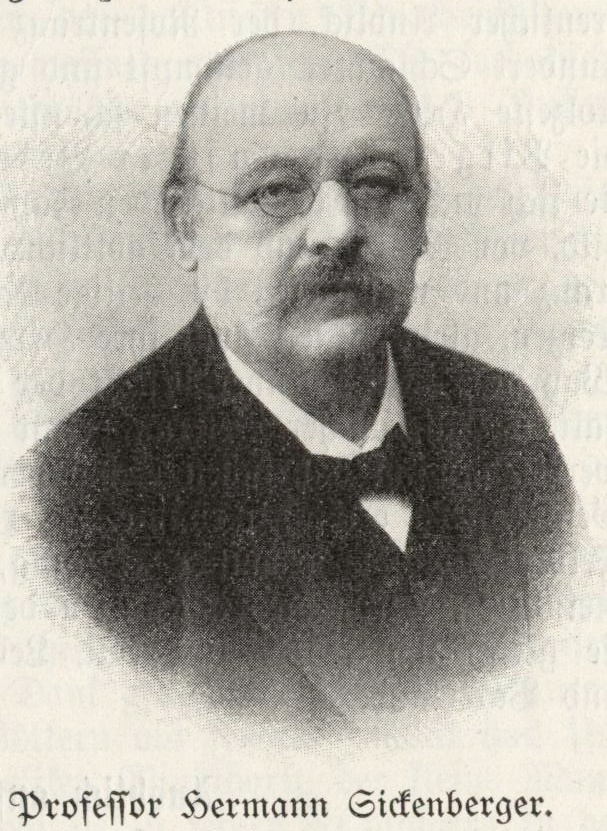 Hermann Sickenberger, Bayerischer Landtagsabgeordneter